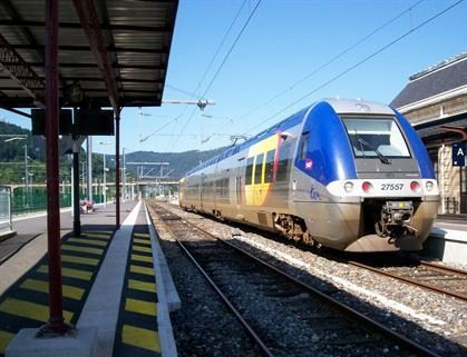 Correspondance avec Z 27500 Métrolor à Saint Dié des Vosges